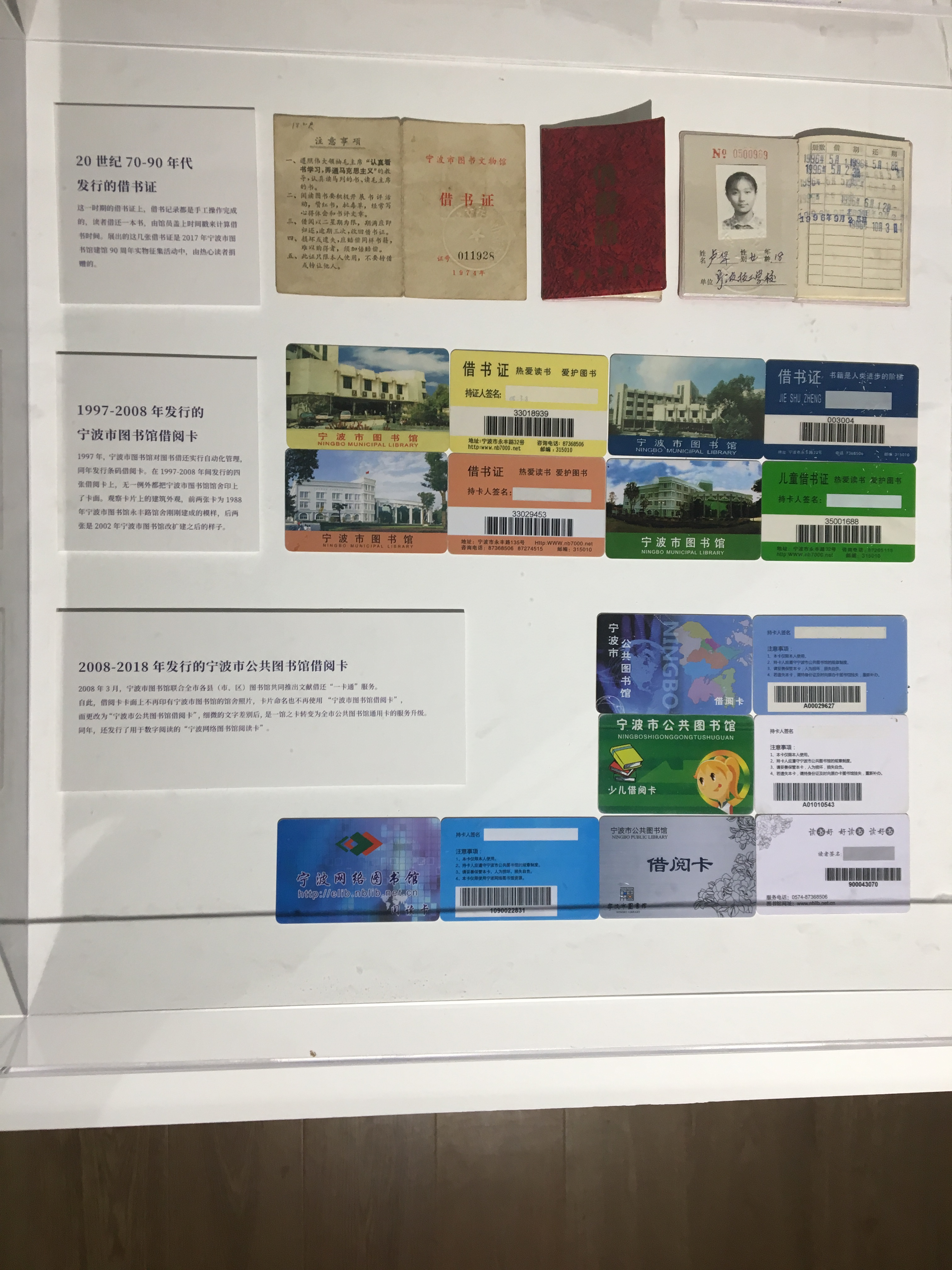 宁波图书馆历史上曾使用的各种借阅卡